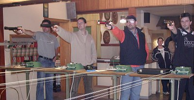 Schießen mit der Luftpistole Bild: Wilfried Wittkowsky, Schützenbund Wesermarsch